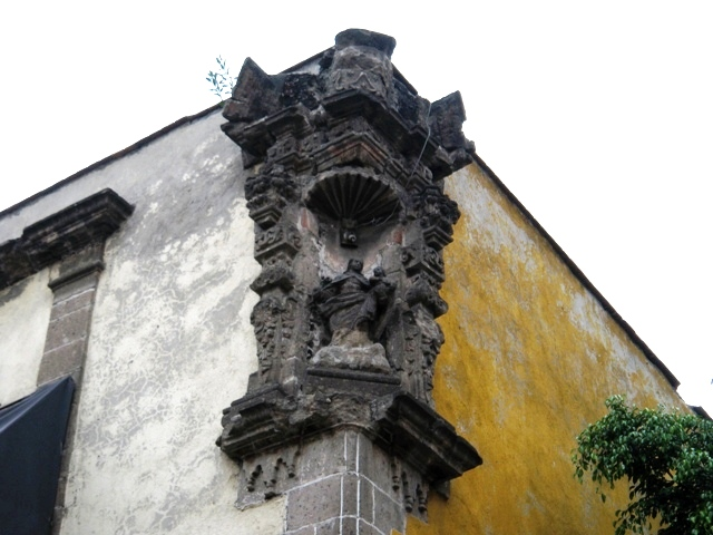 Hornacina en la casa de fray Melchor de Talamantes en el Barrio de la Merced